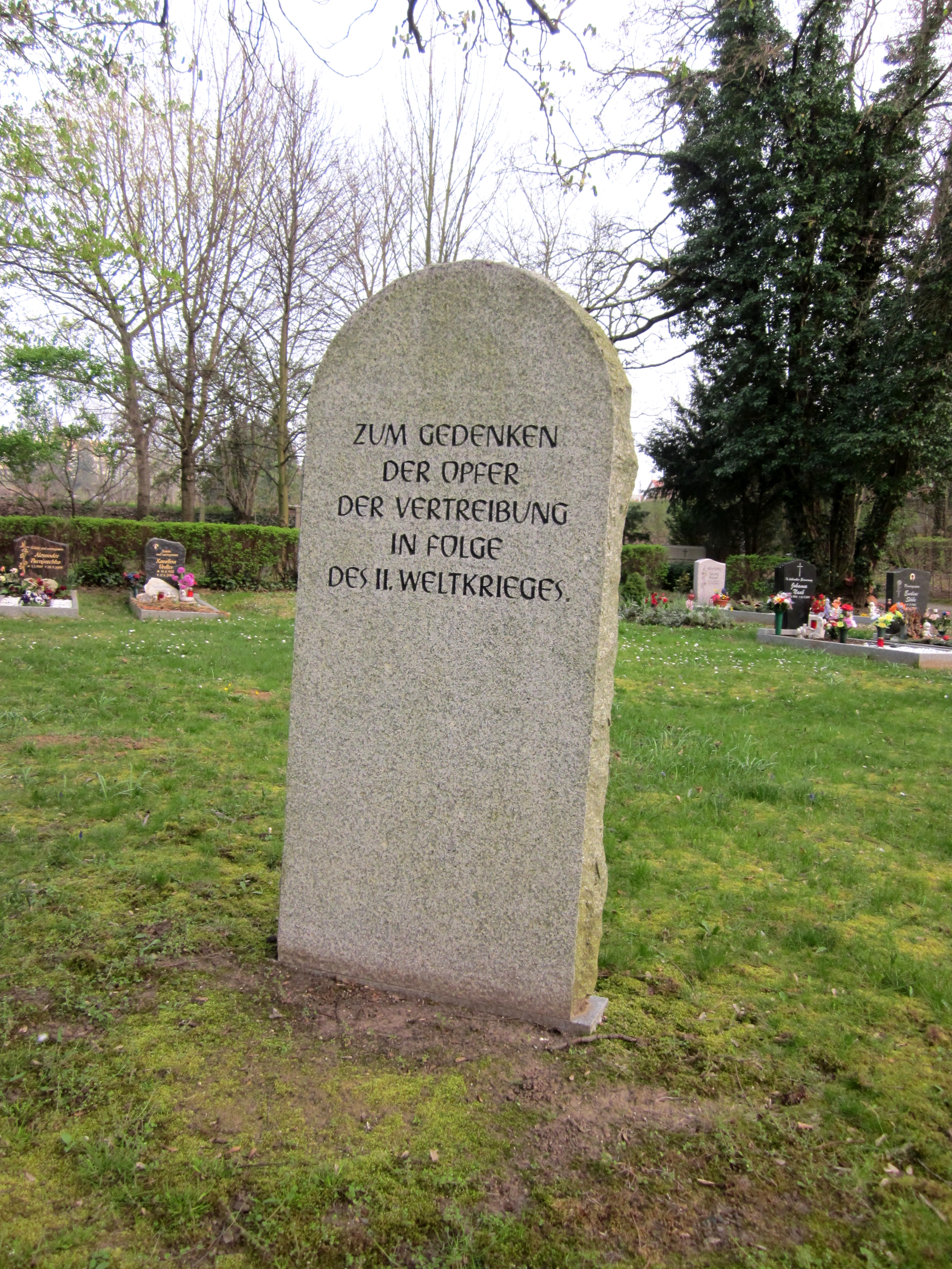 Friedhof Weißenfels: Gedenkstein für die „Opfer der Vertreibung in Folge des II. Weltkrieges“